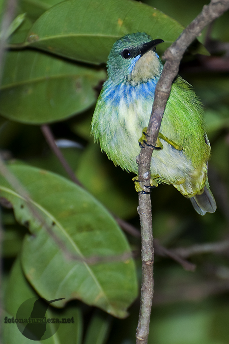 Hembra. Mide 10 cm. y pesa 11 grs. Es más pequeño que Cyanerpes cyaneus, con patas amarillas, cola corta, y sin amarillo en las alas. El macho tiene la garganta negra y el pecho de la hembra presenta un abundante listado.